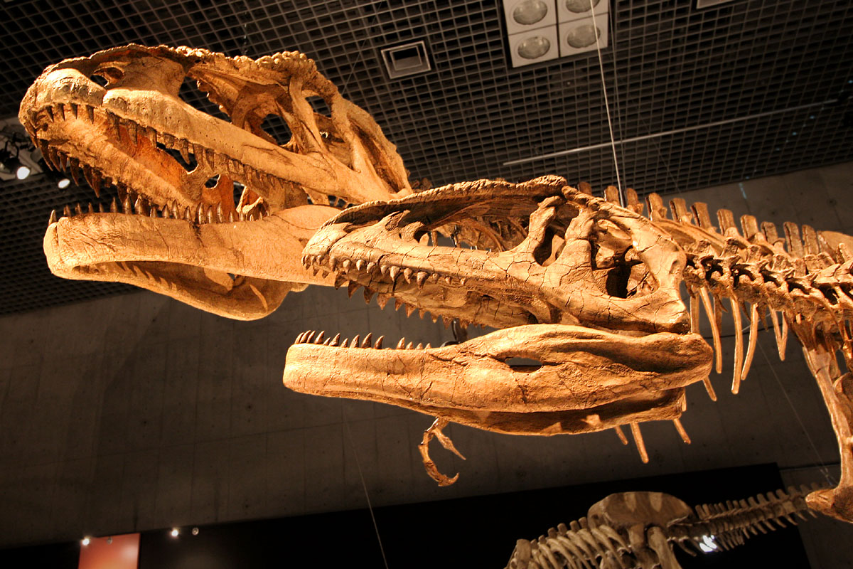 Mapusaurus - 02